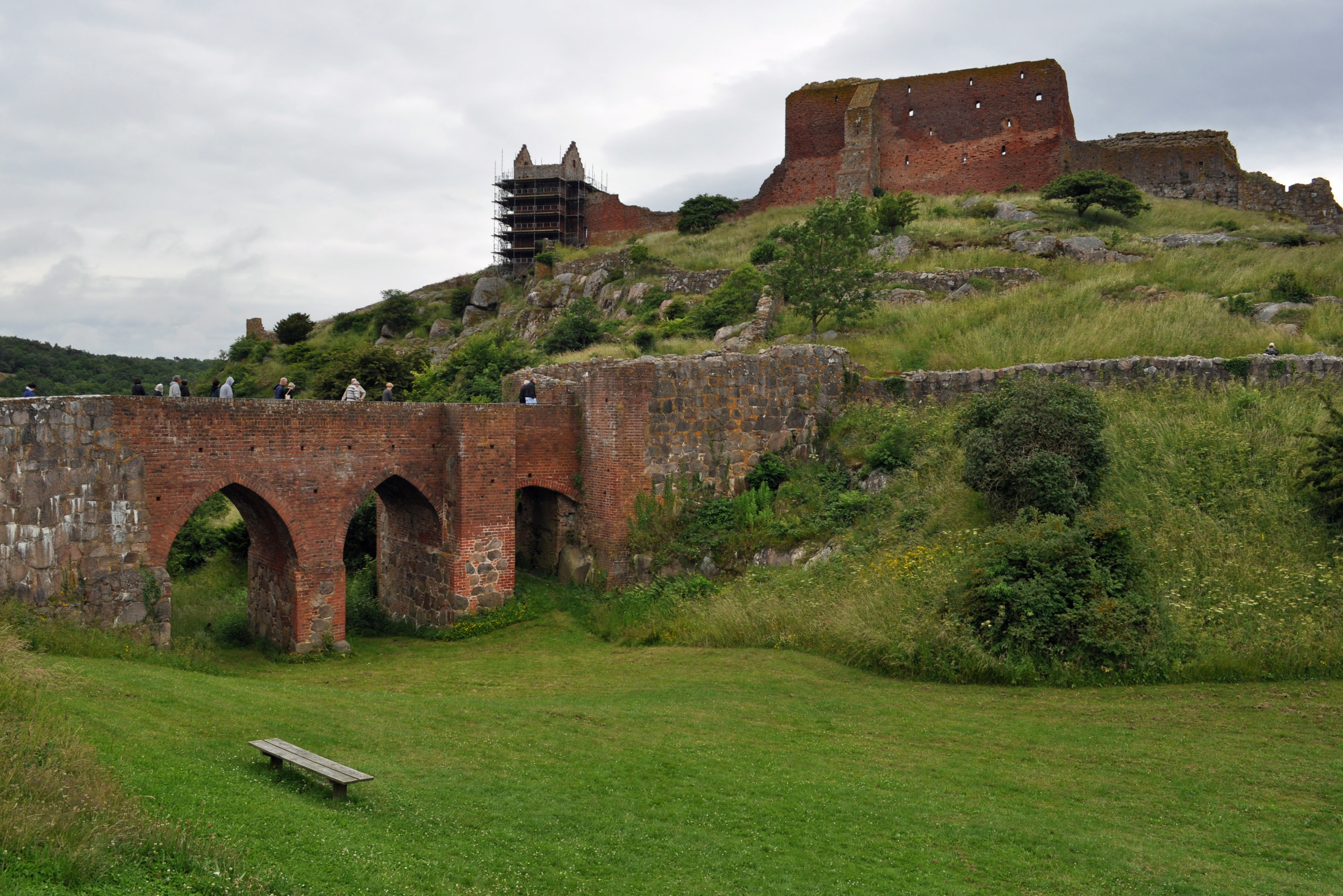 Hammarshus, Bornholm (2012-07-04), by Klugschnacker in Wikipedia (6)